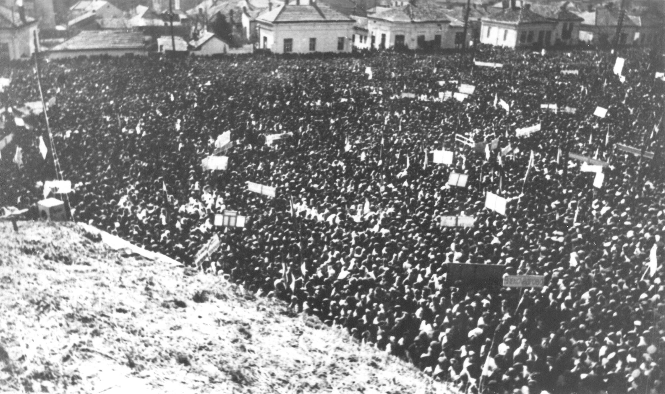 Srpskohrvatski / српскохрватски: Proslava oslobođenja Leskovca 1944. godine.